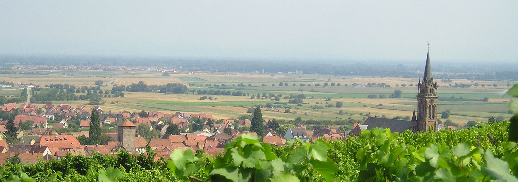 Dambach-la-Ville vu des coteaux